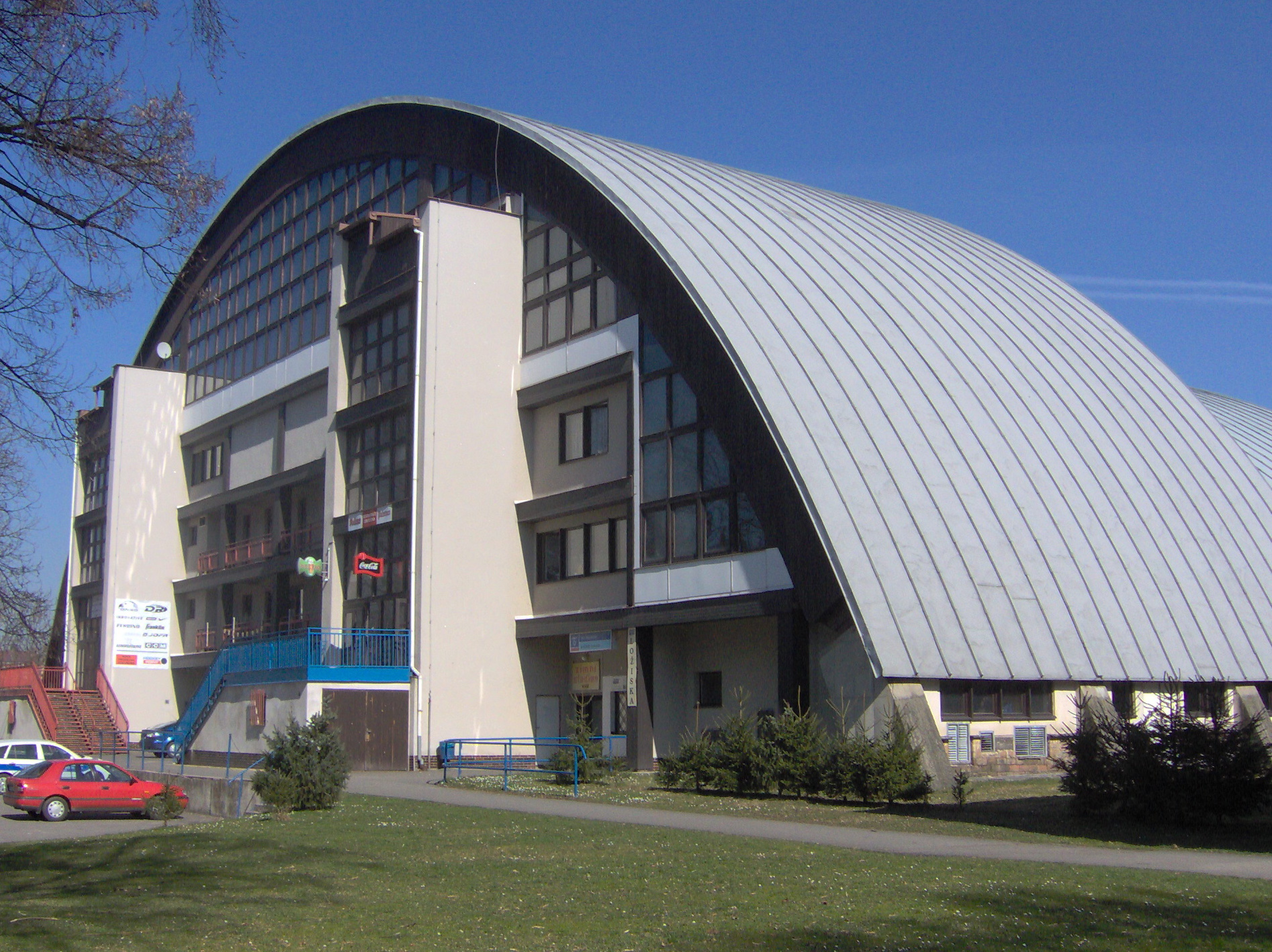 Ice stadium in Strakonice - zimní stadion ve Strakonicích